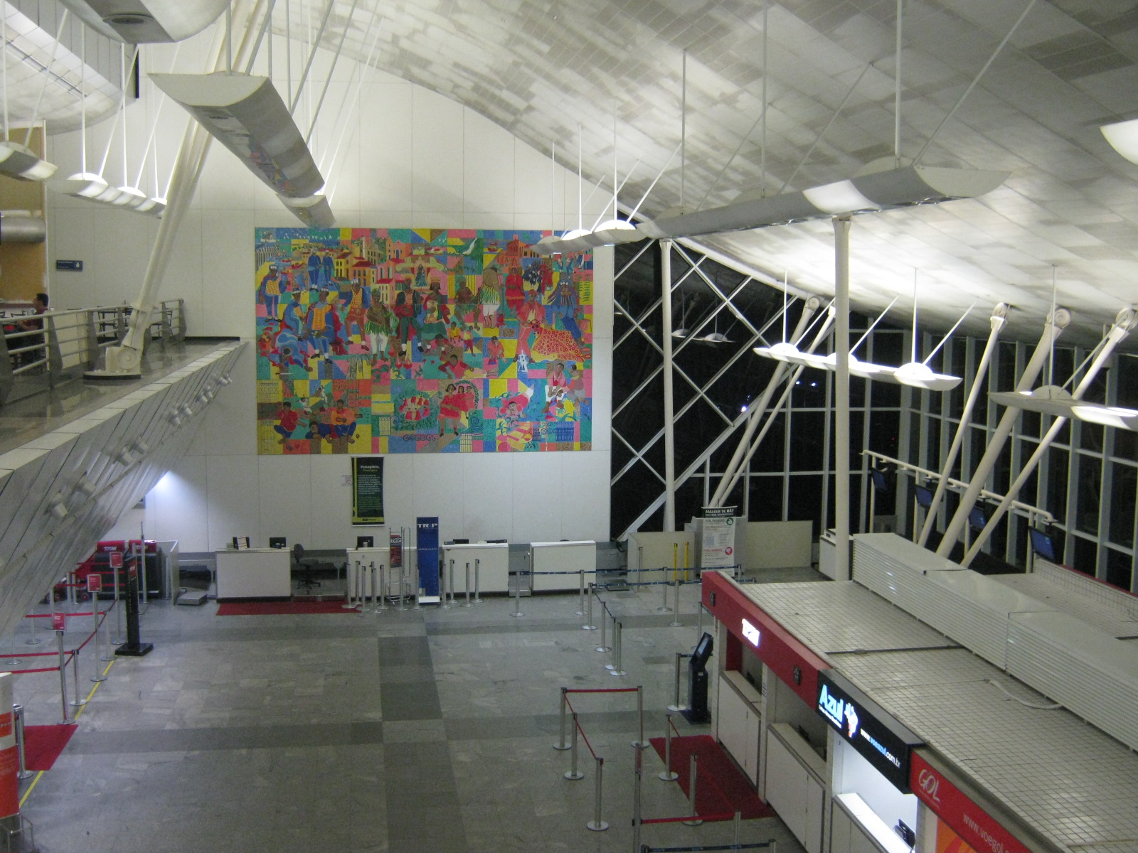 Saguão do Aeroporto Internacional Augusto Severo, Natal, Brasil.